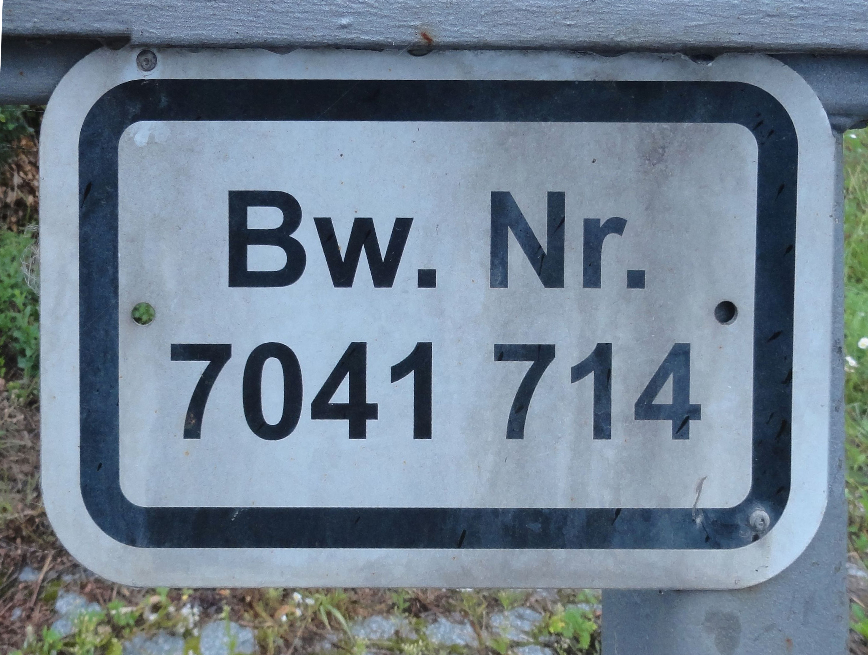 Bauwerksnummer der Brücke über die Donau bei Straubing im Verlauf der Bundesstraße 20; befestigt am südöstlichen Geländerende zur Fahrbahn